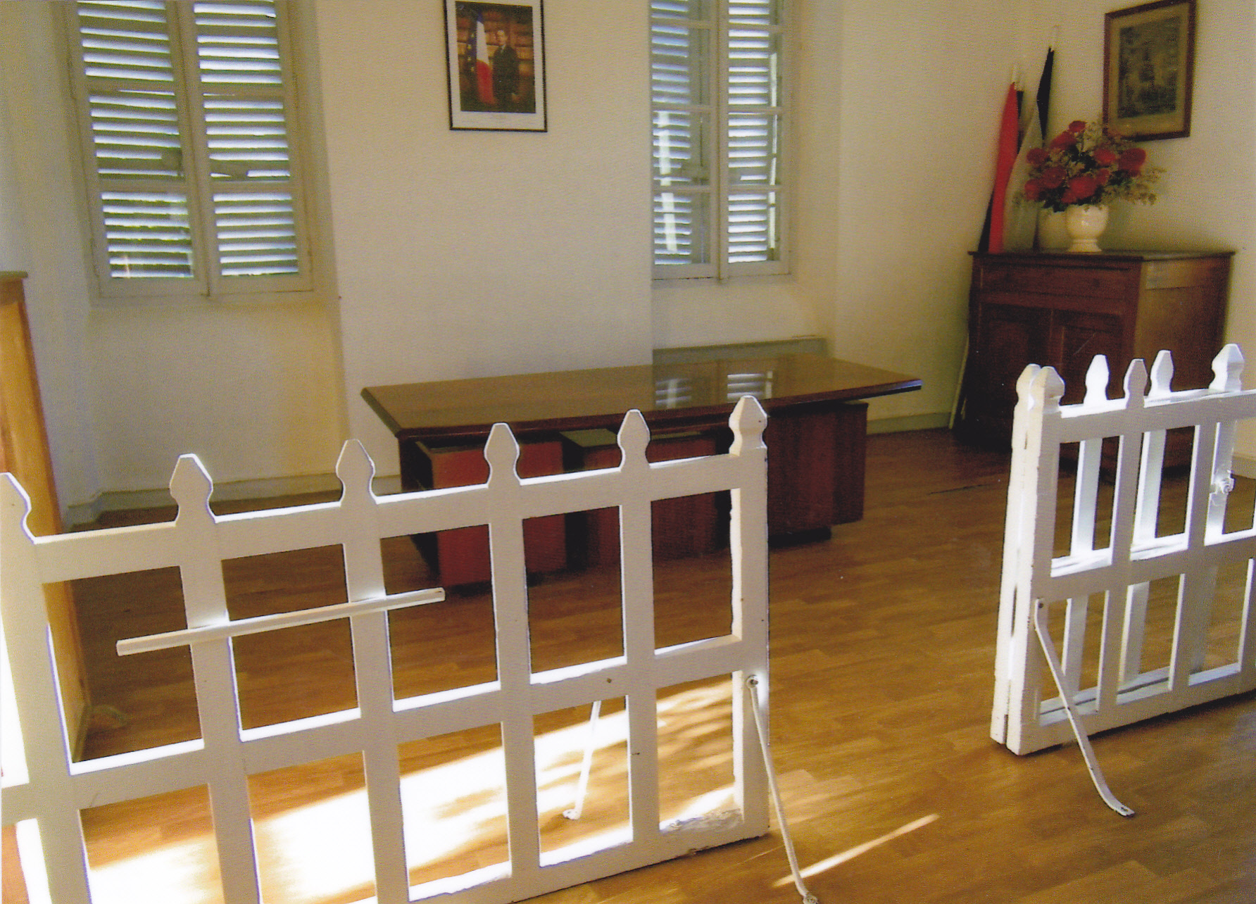 Nestier (Hautes-Pyrénées, France). La barrière du tribunal de justice de paix (1850).